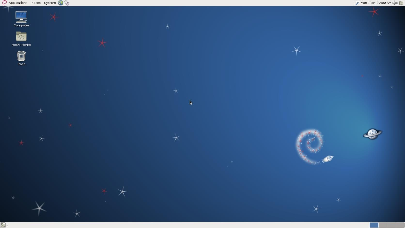 Debian program